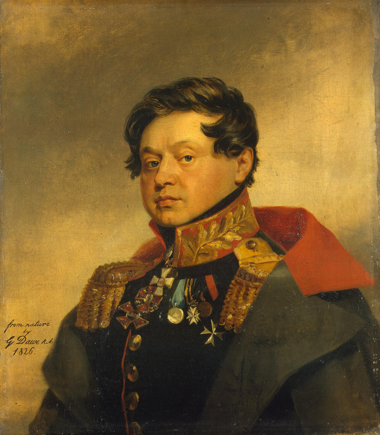 Fyodor Ivanovich Mosolov (09.02.1771 – 25.07.1844) russian general